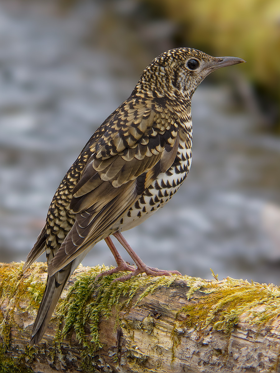 撮影地 北海道東川町